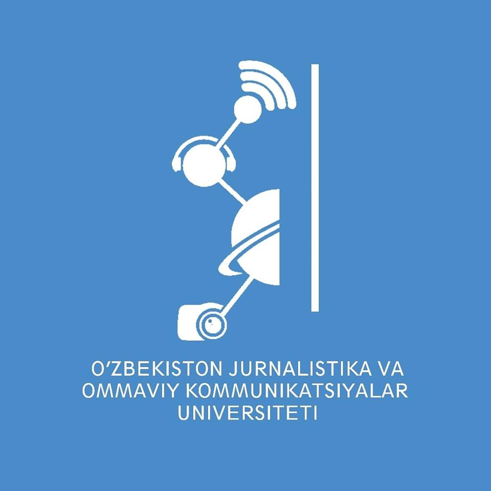 UzJMCU logo